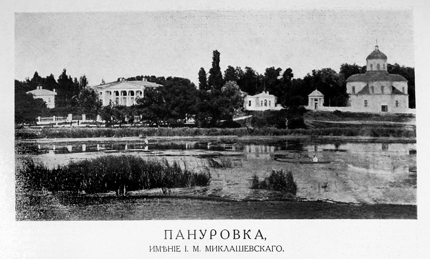 Усадьба Миклашевских в Понуровке Стародубского района (фото из журнала "Столица и усадьба")